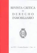 Portada de Revista Crítica de Derecho Inmobiliario